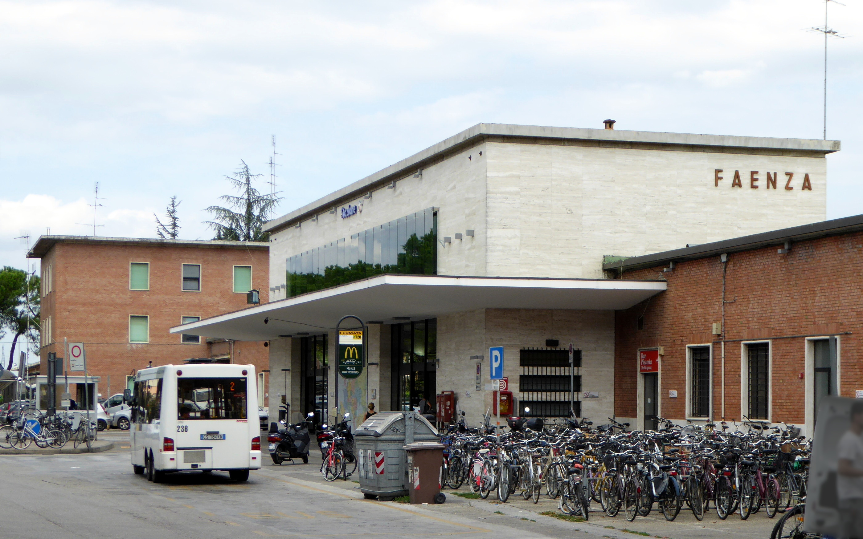 Der Bahnhof von Faenza (IT), von Südosten gesehen.